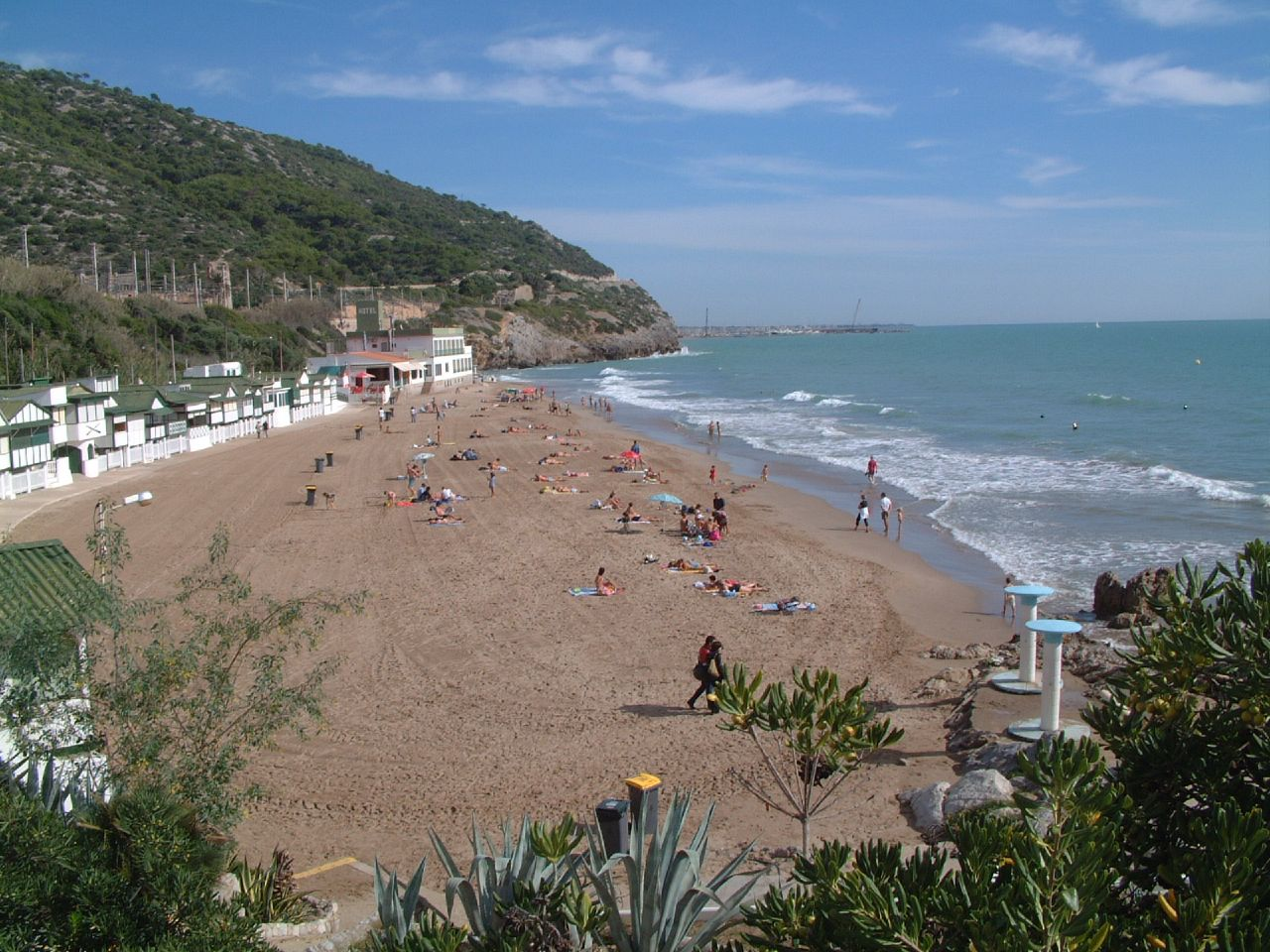 Platja del poble de Garraf